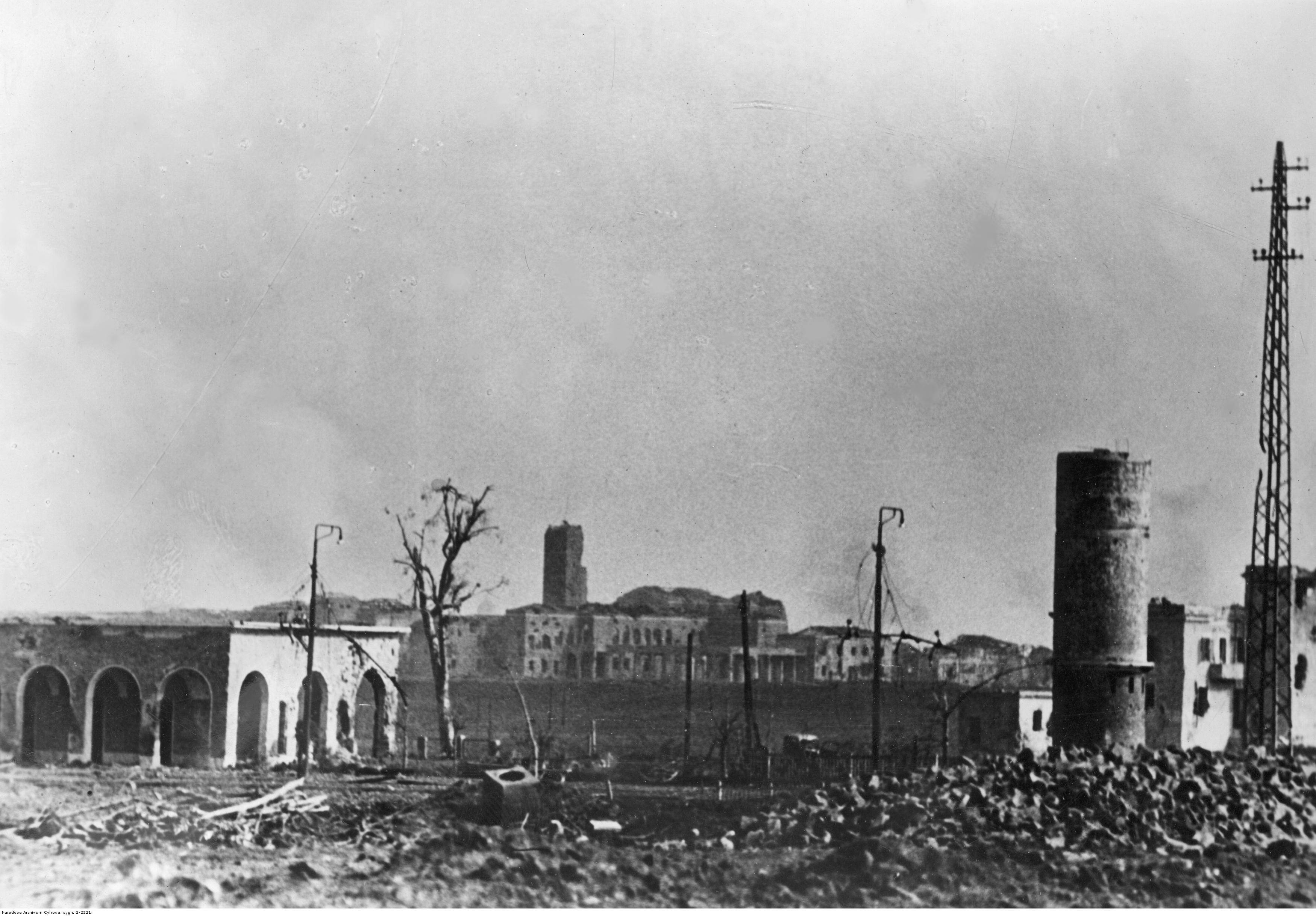 Aprilia. Panorama ruin miasta.